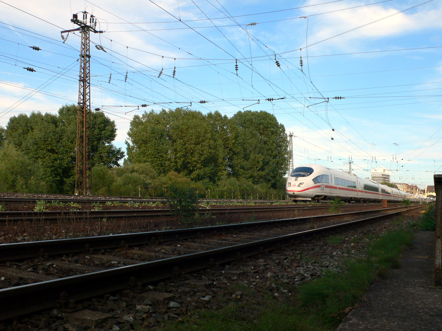 Siebenbogenbrücke in Fürth, Blick von Westen auf die Gleisanlagen mit anfahrendem Intercity-Express Richtung Würzburg Hbf